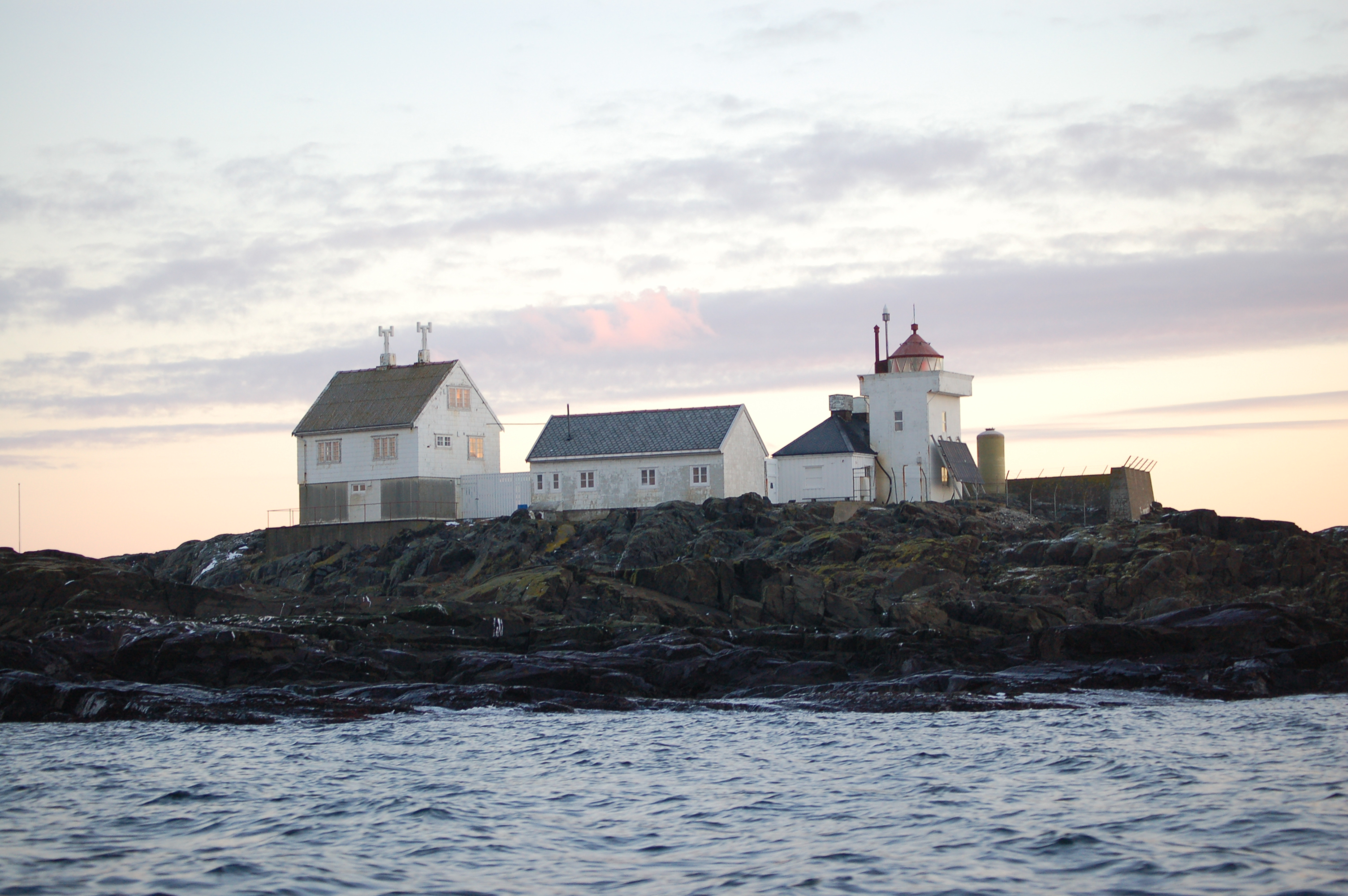 Tvistein fyr, Norway